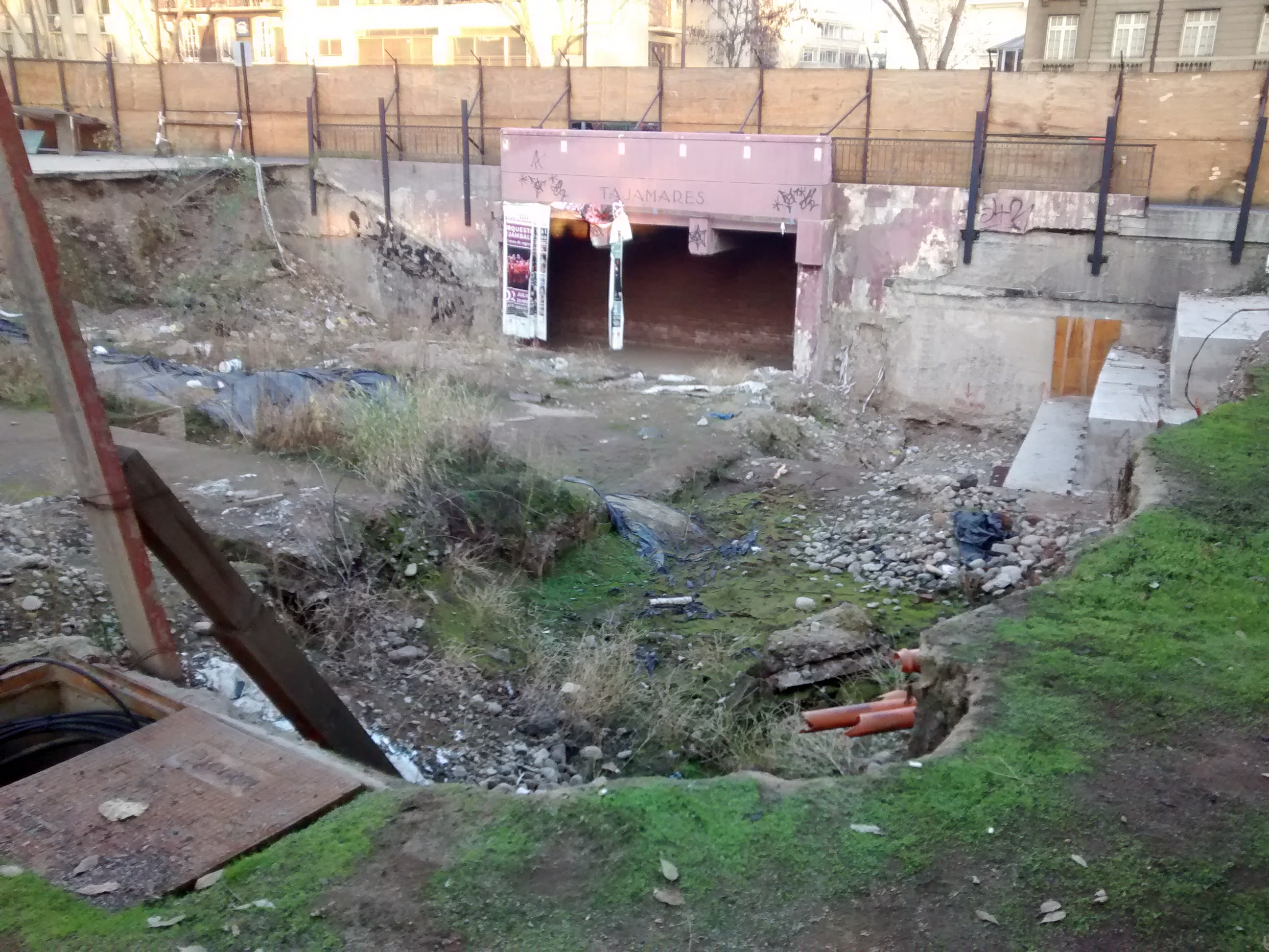 Fotografía actual, Junio 2017, del estado del Museo Los Tajamares. Providencia.